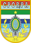 Brasão do Centro de Preparação de Oficiais da Reserva de Porto Alegre